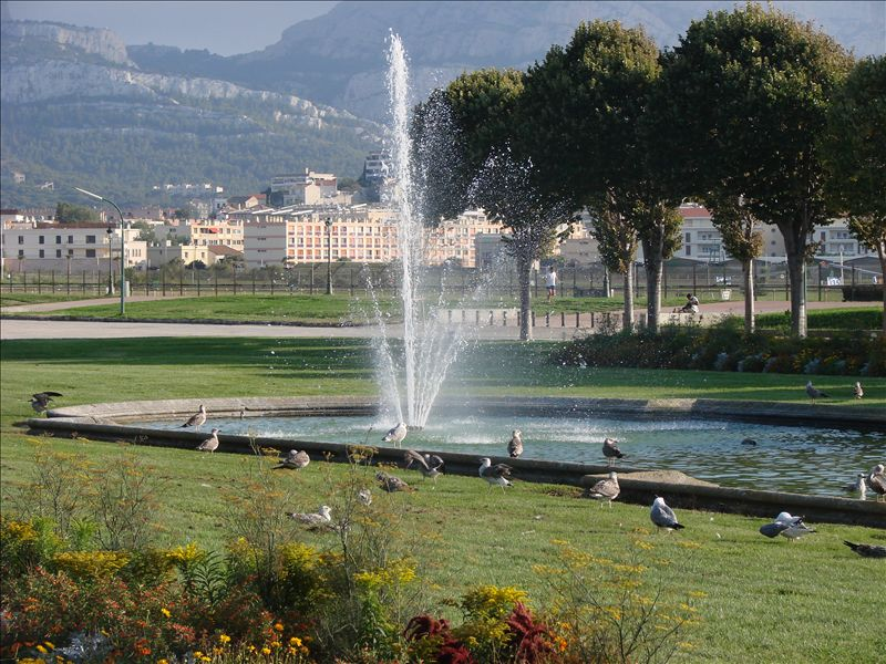 Jet d'eau — Parc Borély (Marseille 8e arr.).